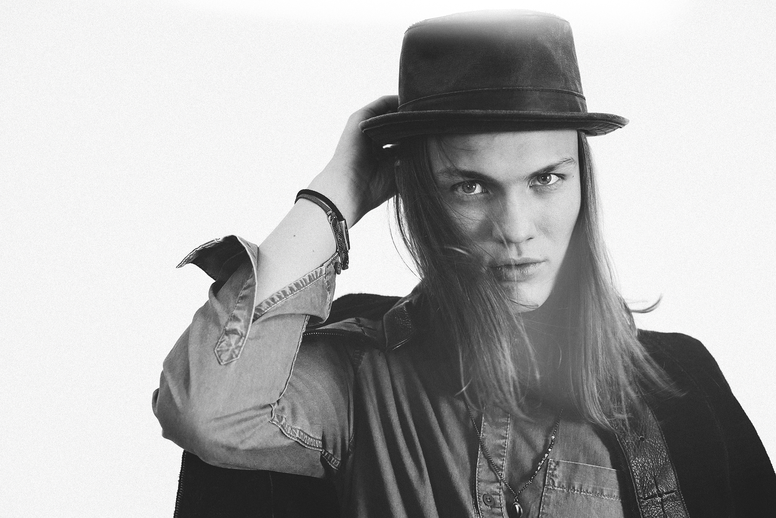 Jakob Karlberg pressbild